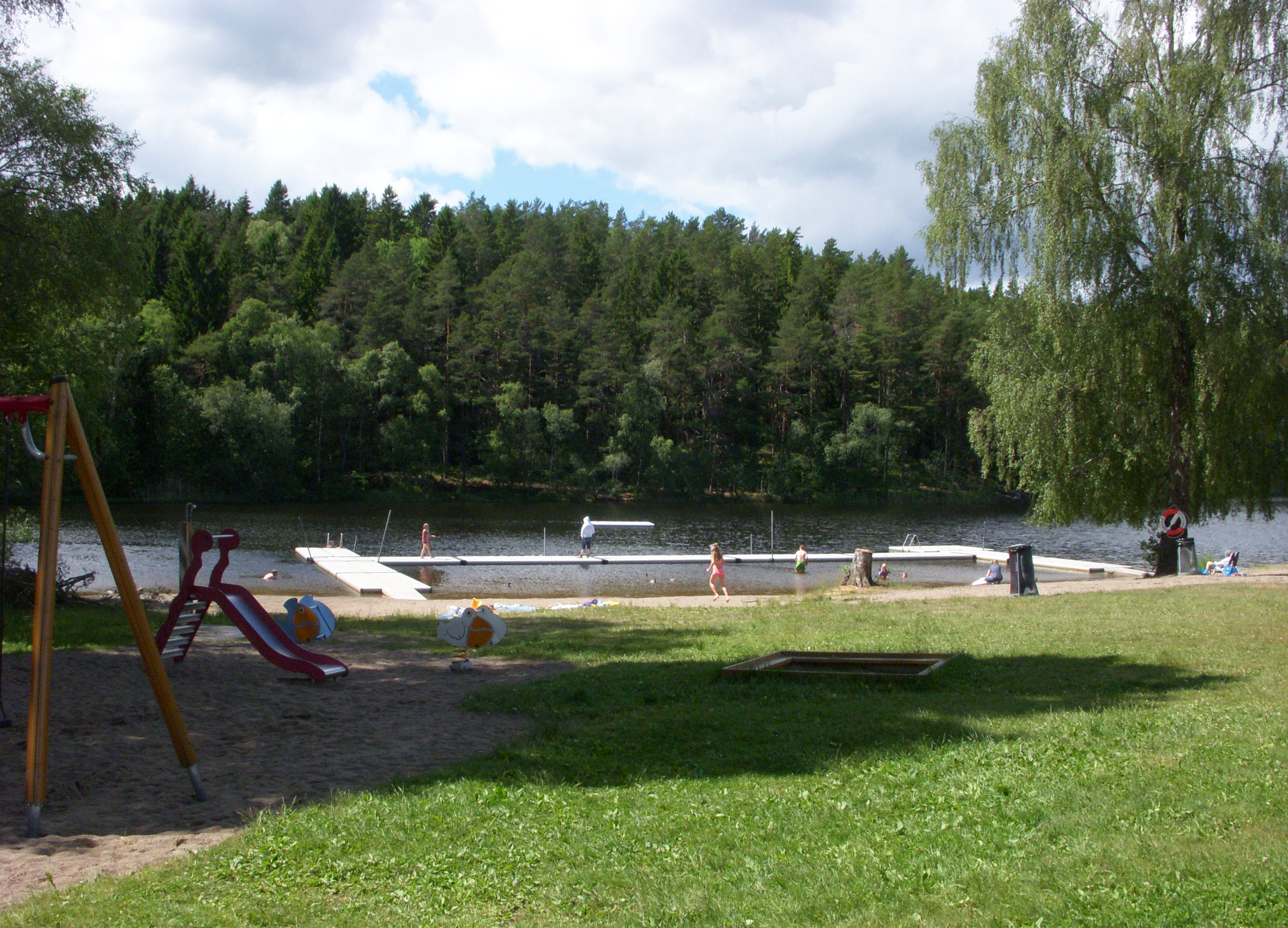 Brosjöbadet